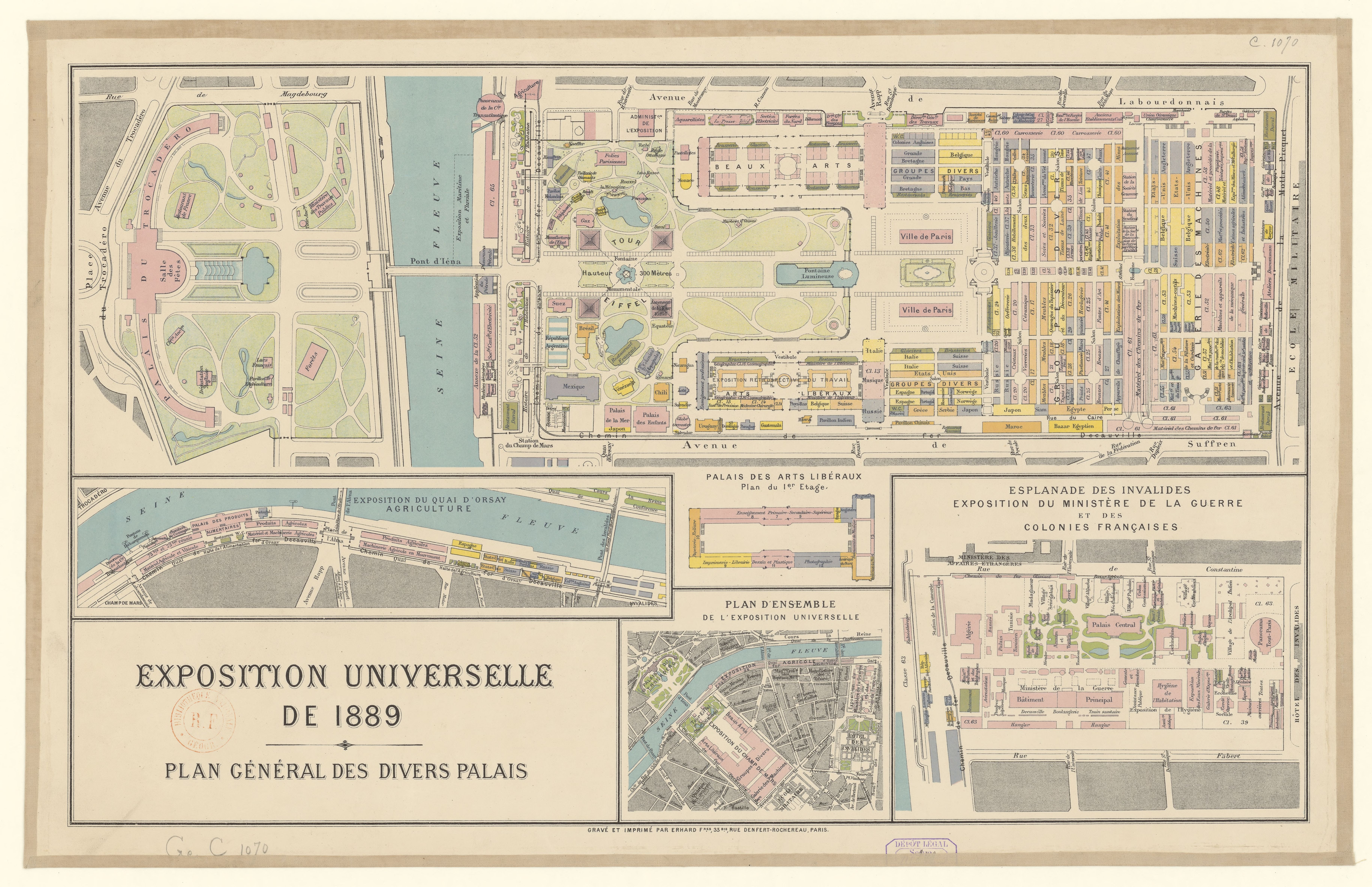 Plan général des différents espaces de l'exposition universelle de 1889 à Paris : Champs de Mars, Trocadéro, Esplanade des Invalides, Quais de la Seine